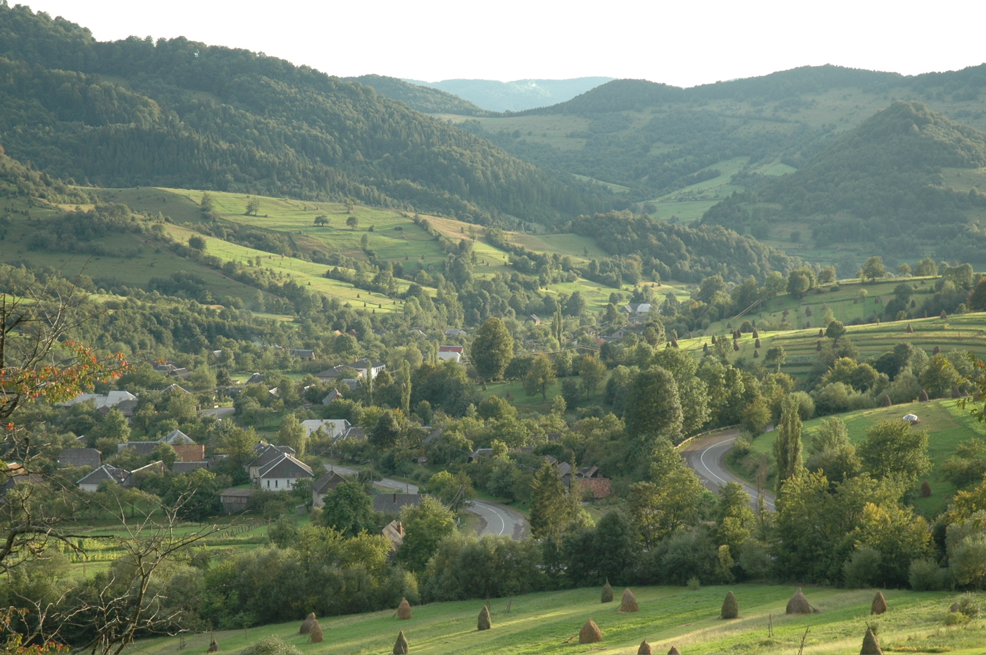 Panoramic view of Uzhok village (Zakarpatska oblast, Ukraine)